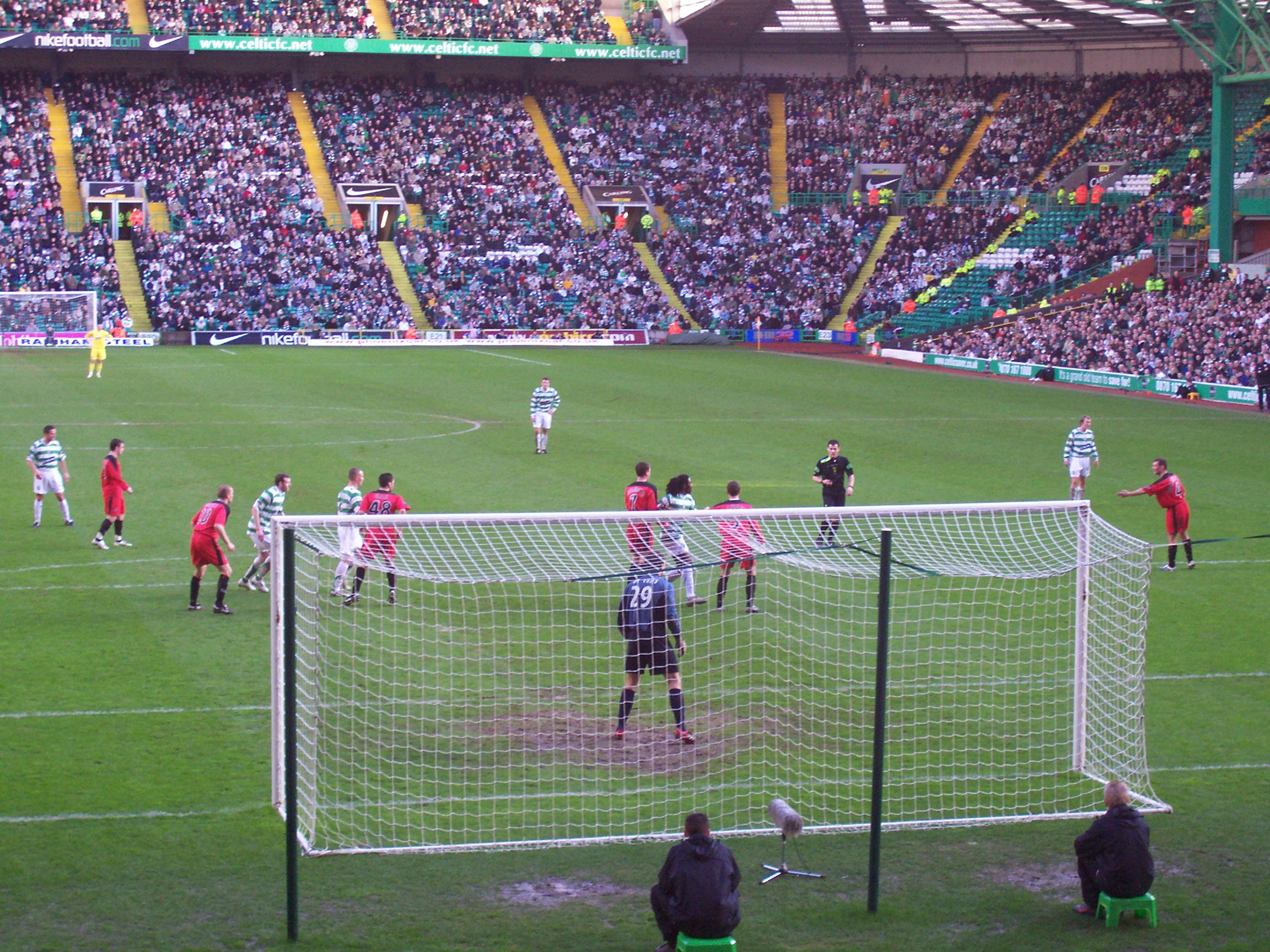 Still, we had a good view.